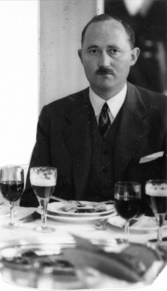 portrett, mann, assisterende direktør i Rederforbundet, sittende ved kuvert.